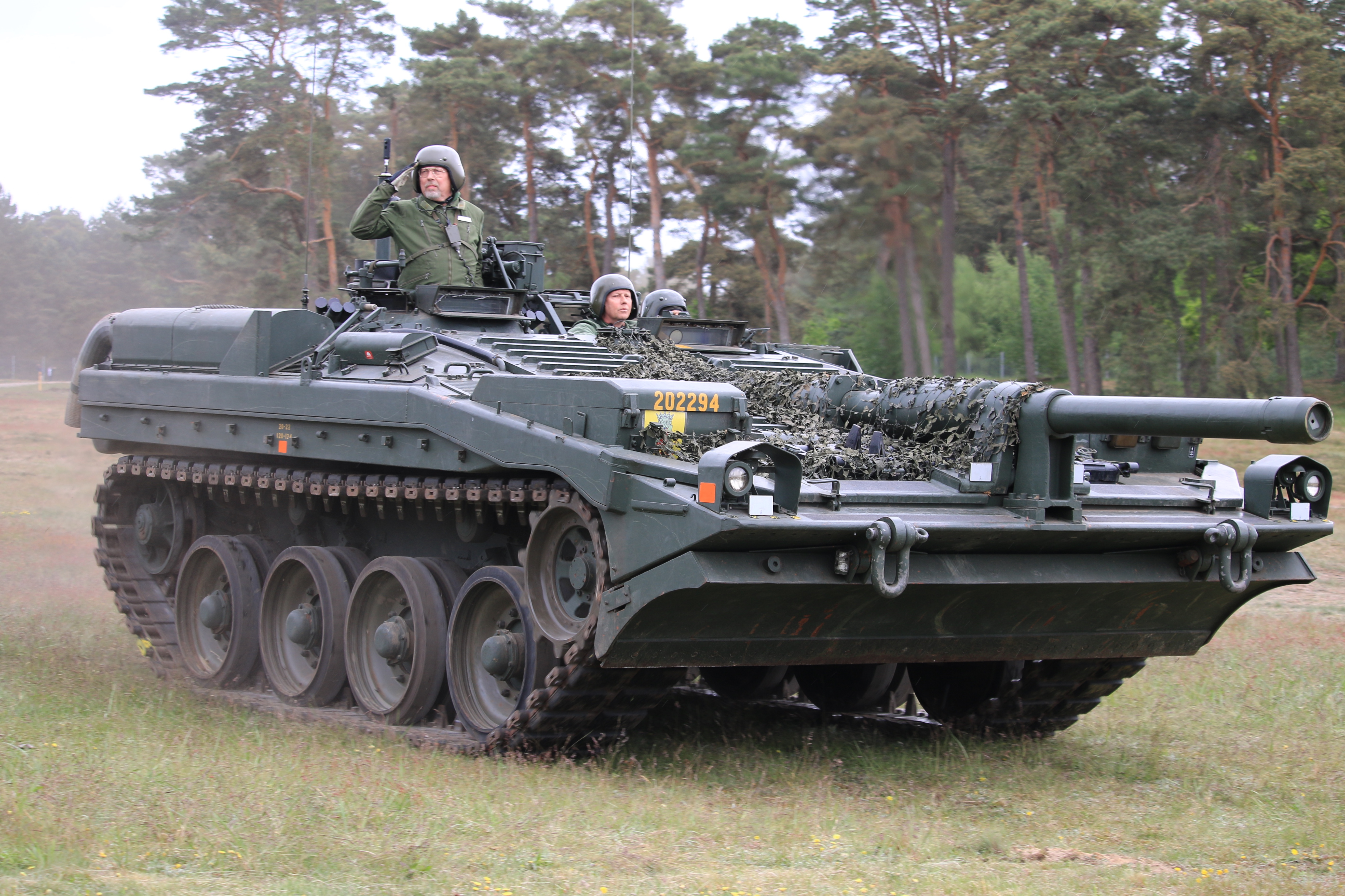 Stridsvagn 103 Revinge 2019